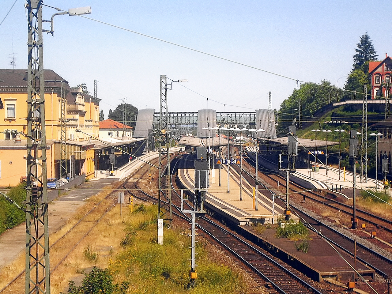 thumb|Original Bearbeitete Version von Image:Neustadt_hbf.JPG durch Smial: Farbausgleich, für besseren Schärfeeindruck verkleinert Original-Beschreibung: (Uploaded by Benutzer:AF666) Hauptbahnhof von Neustadt an der Weinstraße, selbst fotografiert Uploaded with Reworkhelper